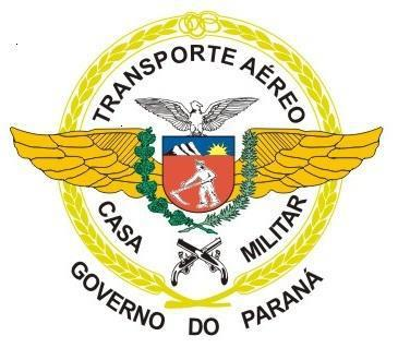 Brasão da Seção de Transporte Aéreo da Casa Militar do Paraná.